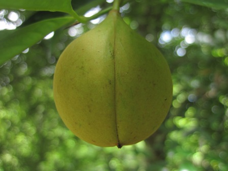 foto dari dekat sebuah pala yang belum masak.